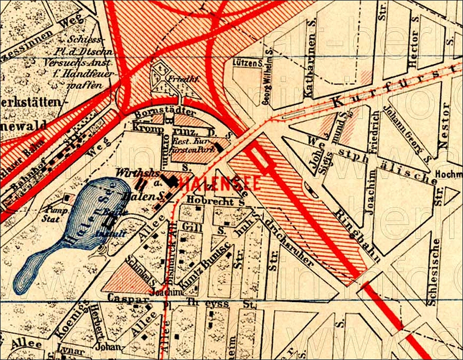 Plan of Berlin-Halensee (Beilage zum Berliner Adressbuch 1893)